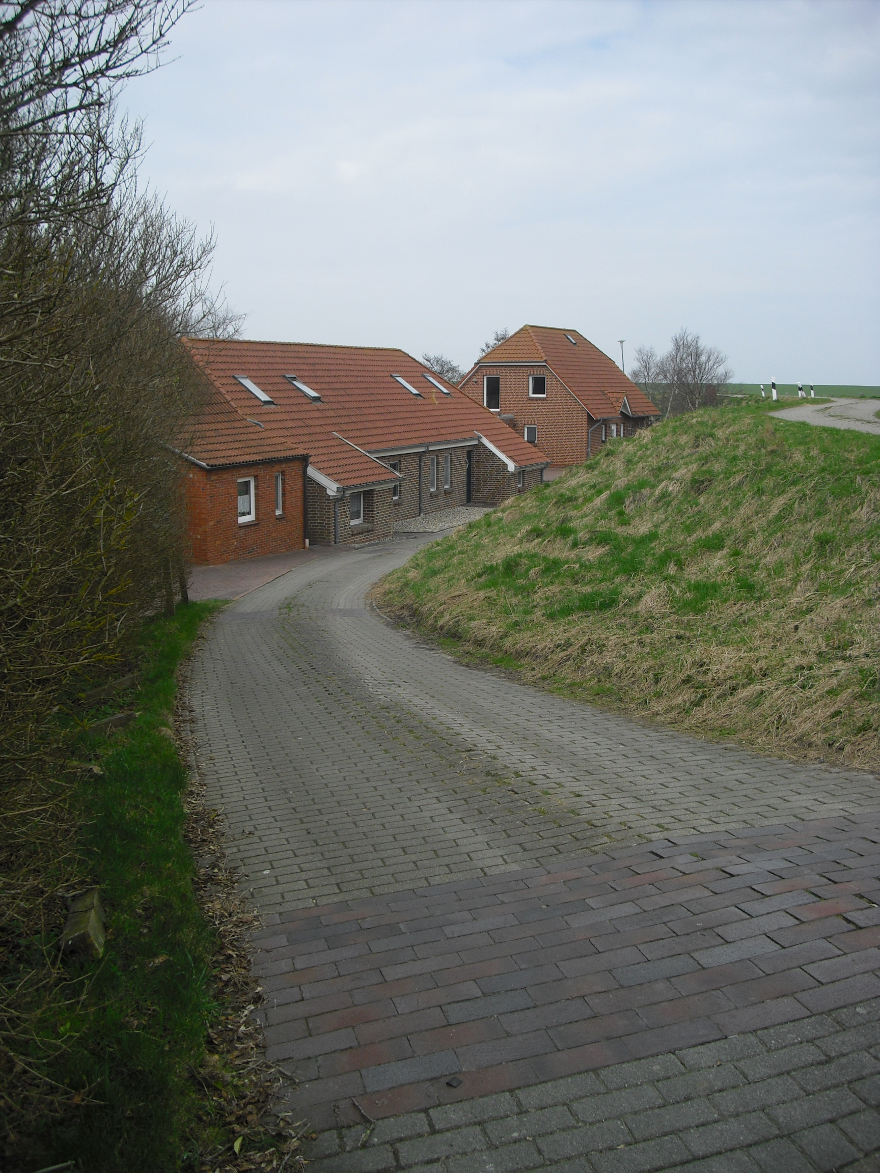 Hilgenriedersiel (Gemeinde Hagermarsch, Niedersachsen, Deutschland)